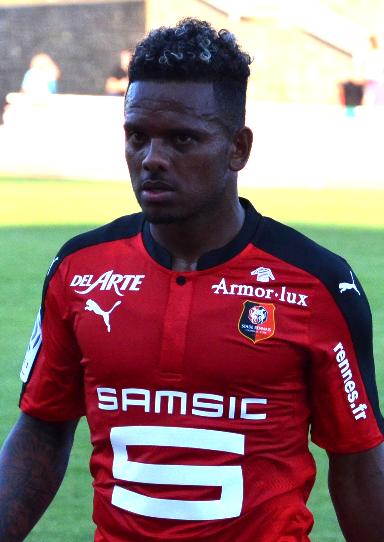 Photographie prise lors du match opposant le Stade rennais à l'US Avranches en match amical au stade René-Fenouillère d'Avranches le 30 août 2016. Ici, Kermit Erasmus.